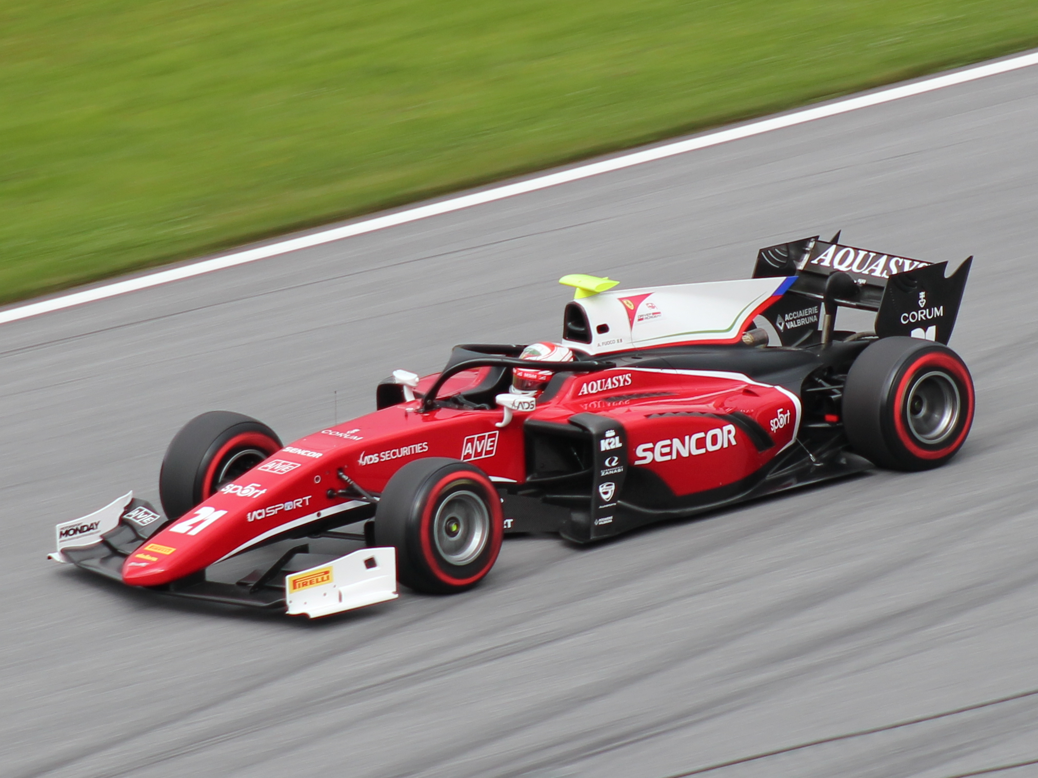 21 Antonio Fuoco beim Rennwochenende in Österreich 2018 (1)